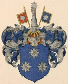 Mensenkampffi suguvõsa aadlivapp